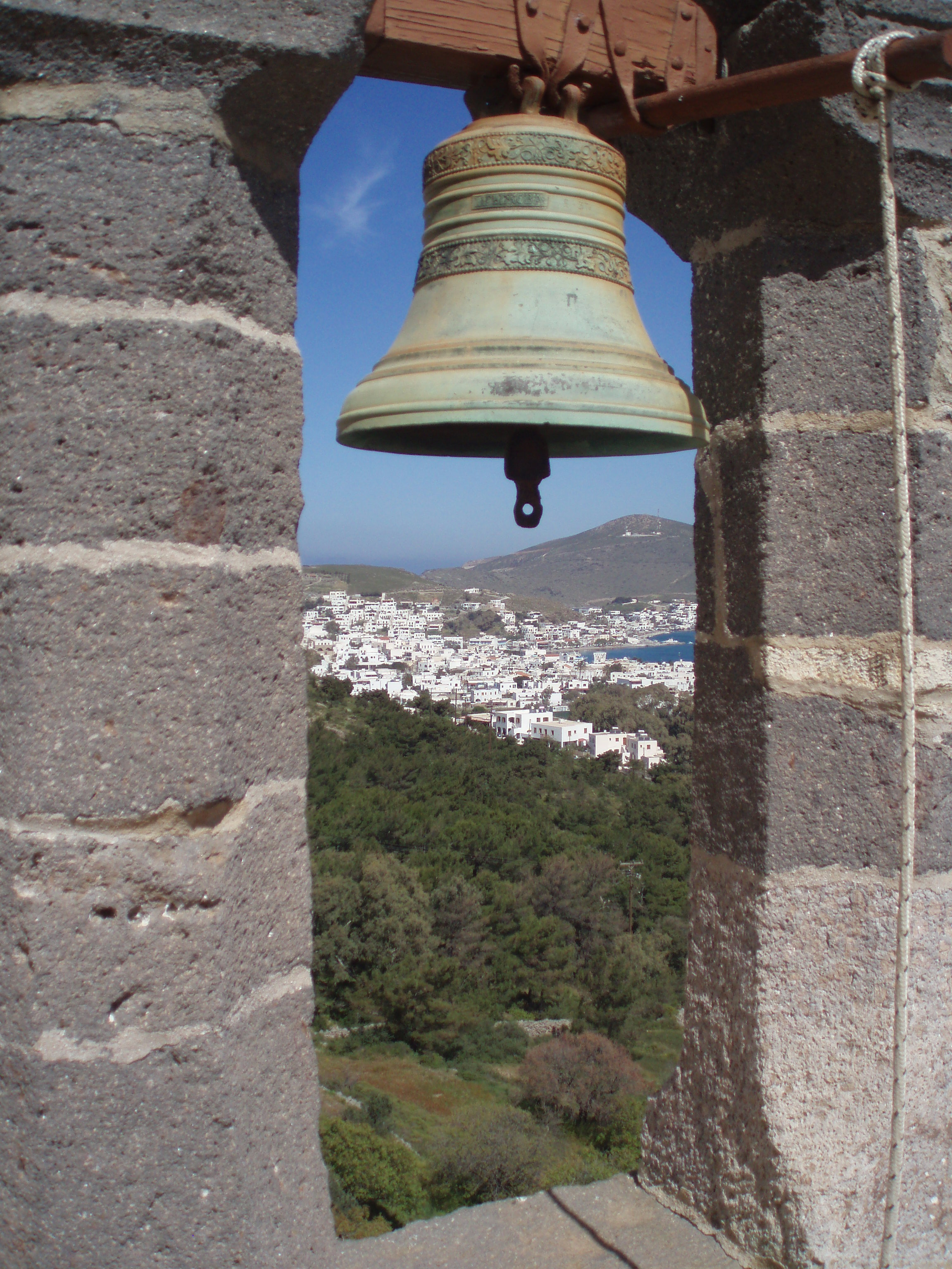 Η Πάτμος